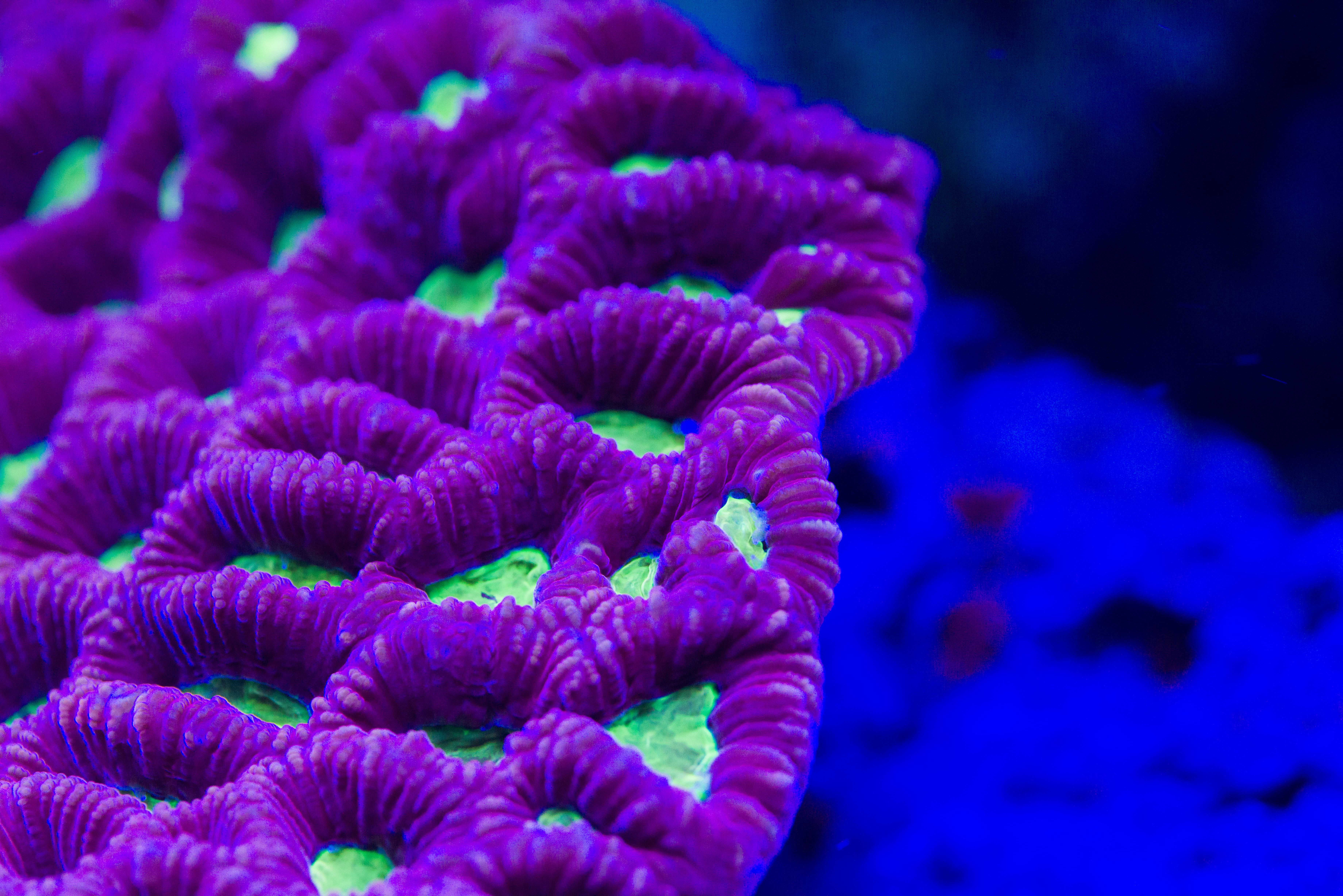 Favites sp, foto macro bajo luz actínica